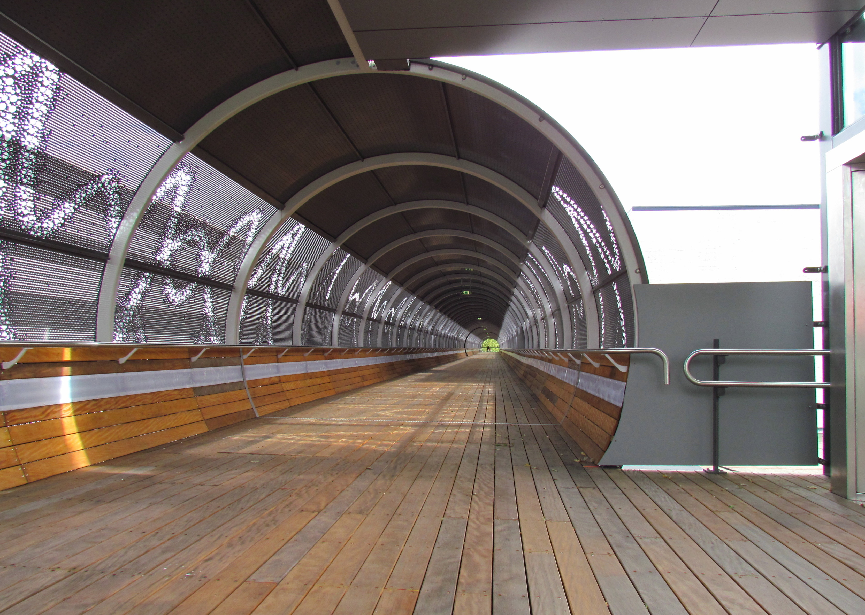 Interieur van de nieuwe traverse van station Hilversum Noord naar het Media Park, genomen vanaf het Media Park